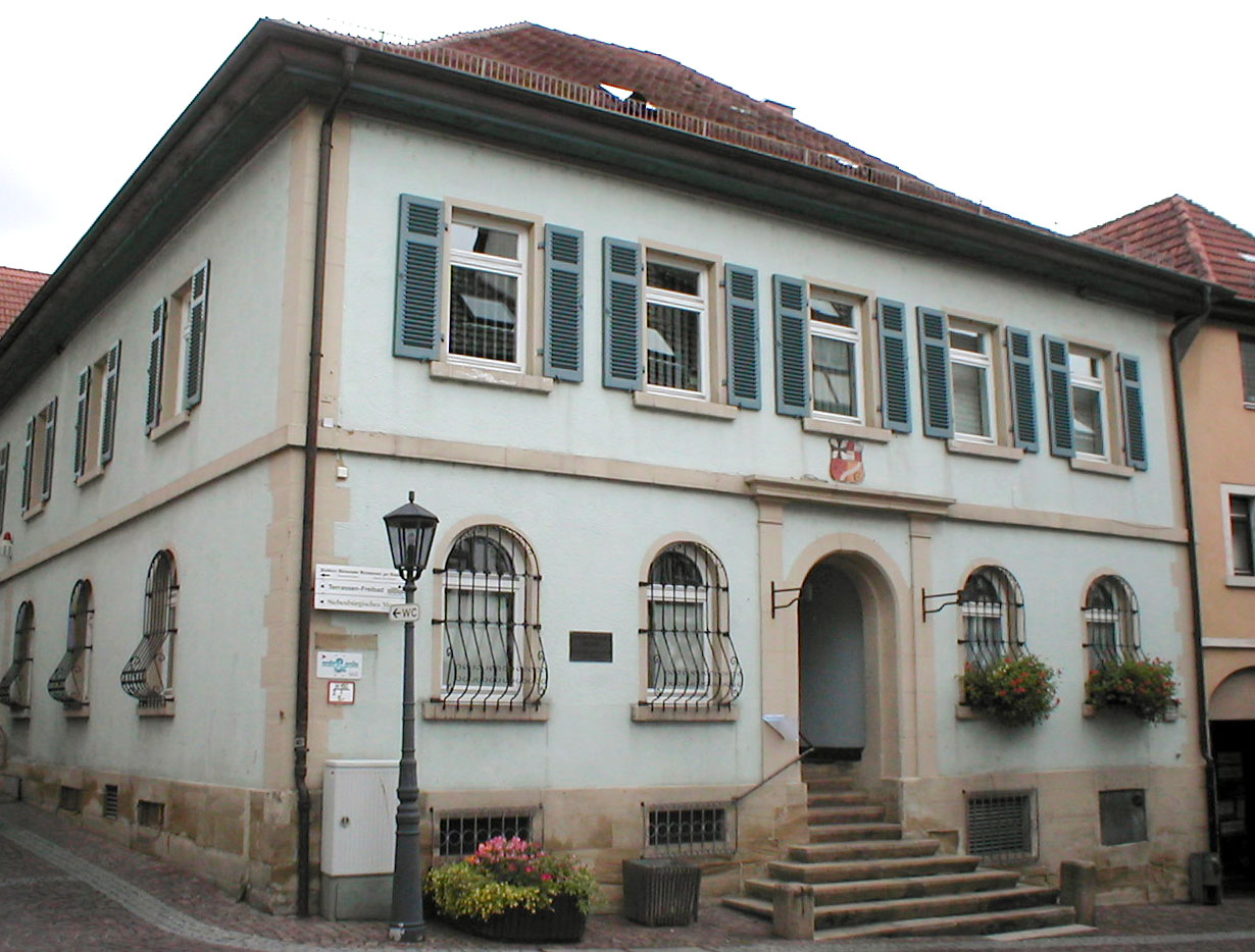 Altes Rathaus in Gundelsheim, RRathaus 1860-1979